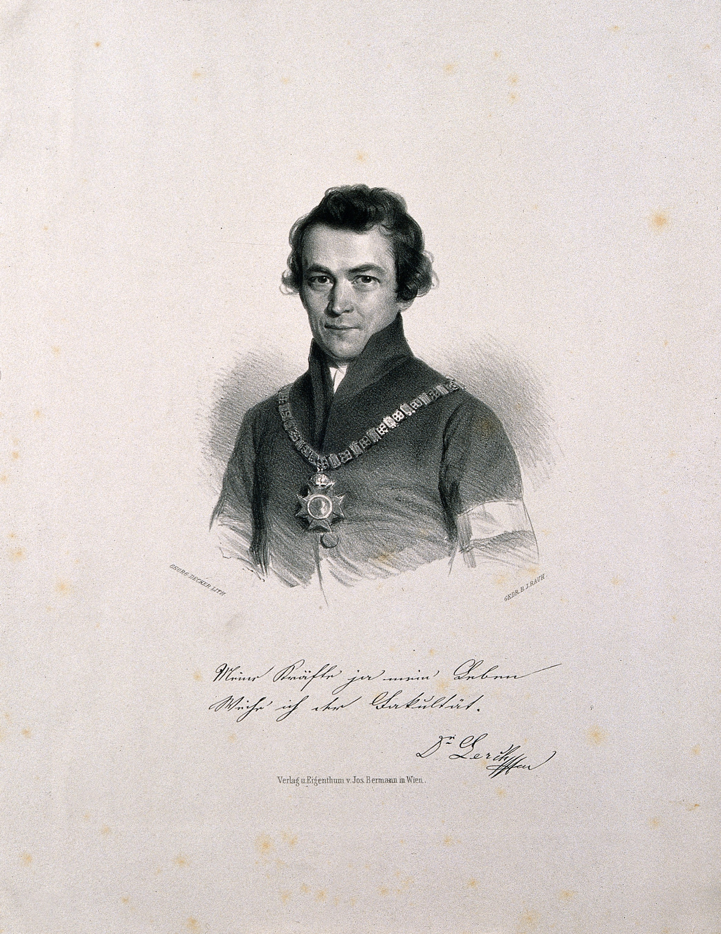 Genre/Technique: Portrait prints. Lithographs. Subject name: Lerch, Johann Alexander, fl. 1880-1900.